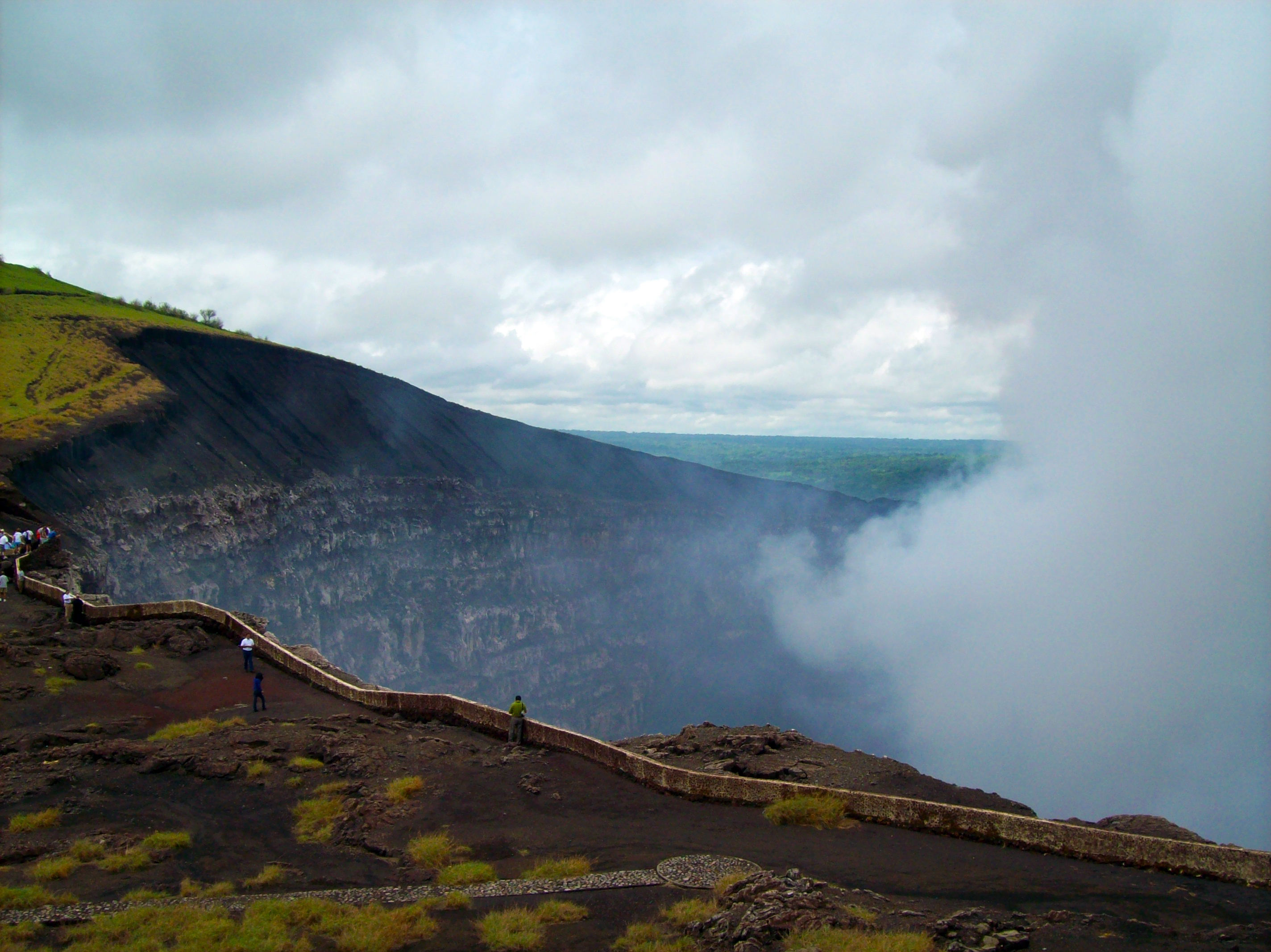 Masaya, Nicaragua